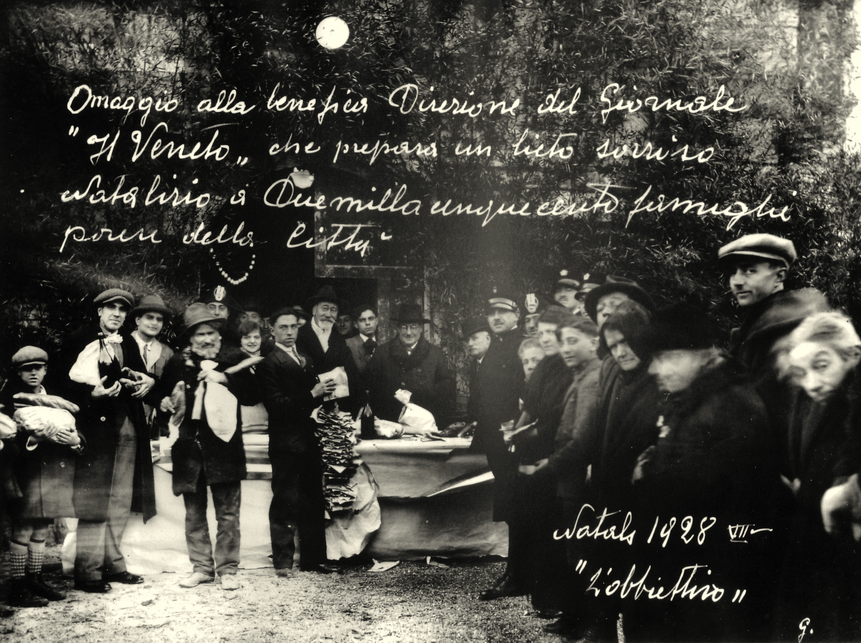 Foto scattata dinanzi alla sede de "Il Veneto" in via Belle Parti 20 a Padova. Alfredo Melli è al centro della foto, dietro al tavolo dove si vede un pacco dono; alla sua destra, con sciarpa bianca, pizzo e baffi, è Italo Szathvary consuocero di Melli